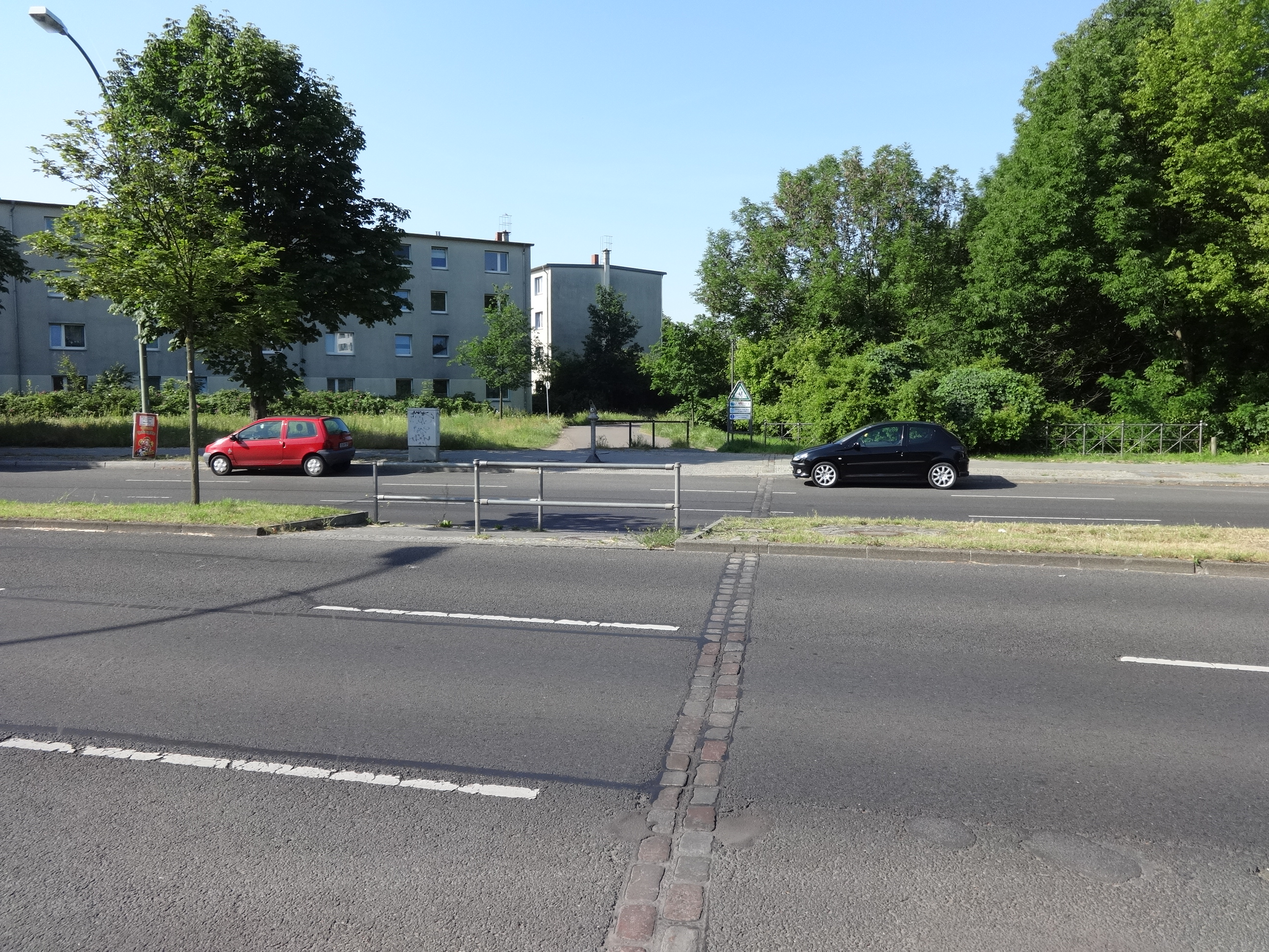 Straßenland mit ehemaligem Mauerverlauf an der Sonnenallee in Berlin-Baumschulenweg (Blickrichtung Neukölln)